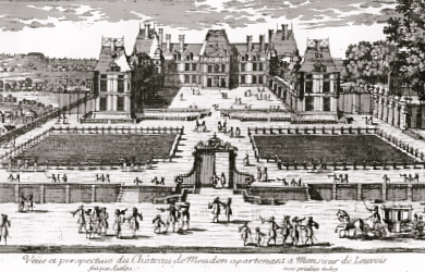 Scan d'un dessin libre de droit, titre "vue et perspective du château de Meudon appartenant à Monsieur de Louvois"